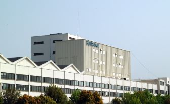 サンスターの本社